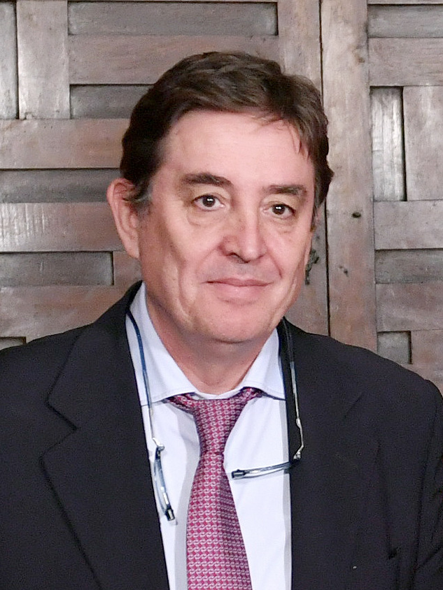 El Canciller, Néstor Popolizio, y el director del Instituto Cervantes, Luis García Montero, firmaron el acuerdo que establece la colaboración para celebrar el IX Congreso Internacional de la Lengua Española (CILE) que se celebrará en mayo de 2022 en la ciudad de Arequipa.